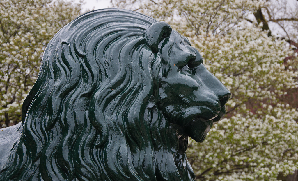 Jardin botanique de Montréal, 4101, rue Sherbrooke Est, (Canada). (Protection LHN. Voir la liste des lieux patrimoniaux de Montréal pour plus de détails).